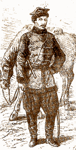 January Uprising Powstanie Styczniowe - huzar